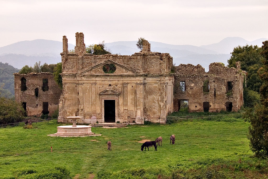 Canale Monterano, Lazio , Italia